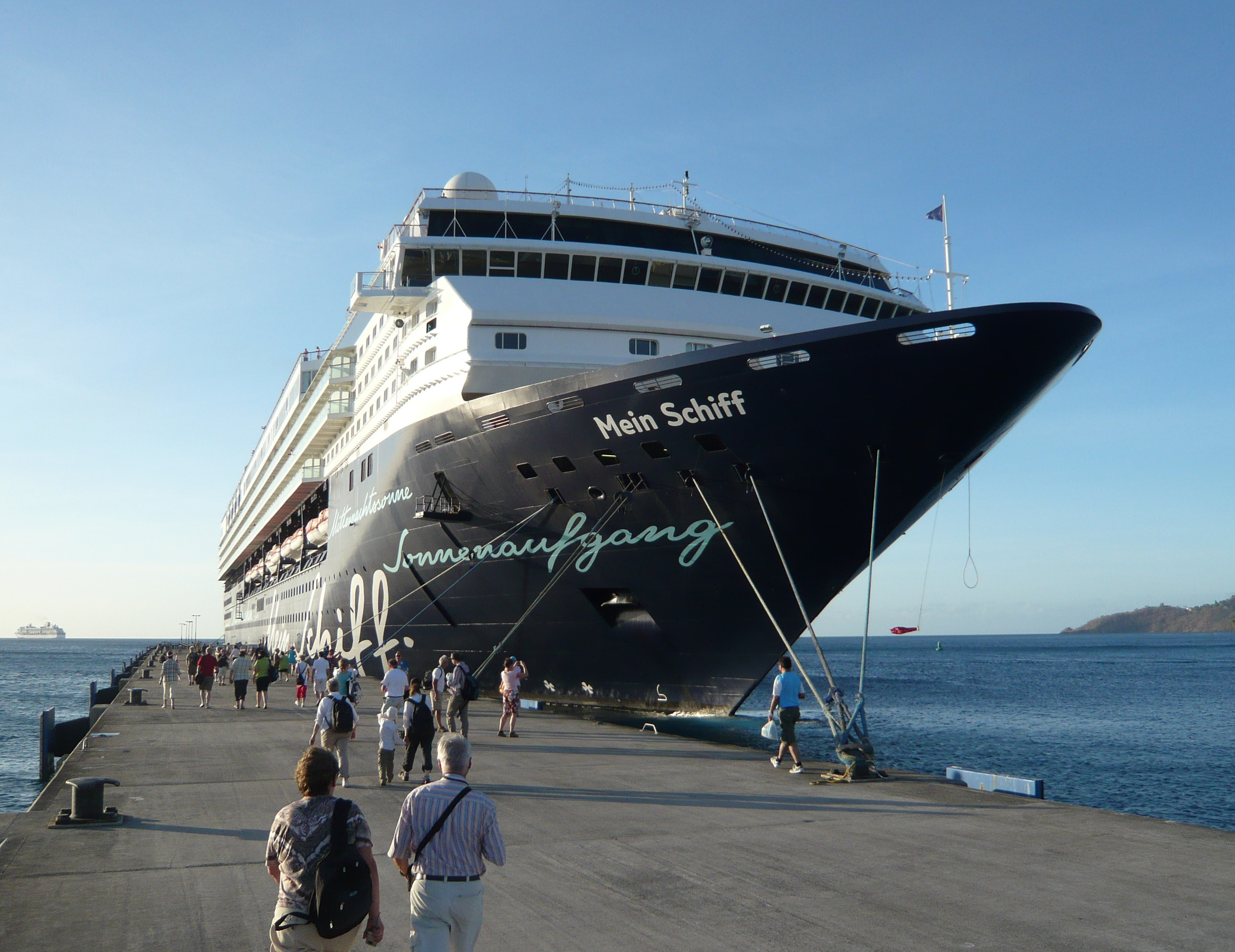 Schiff